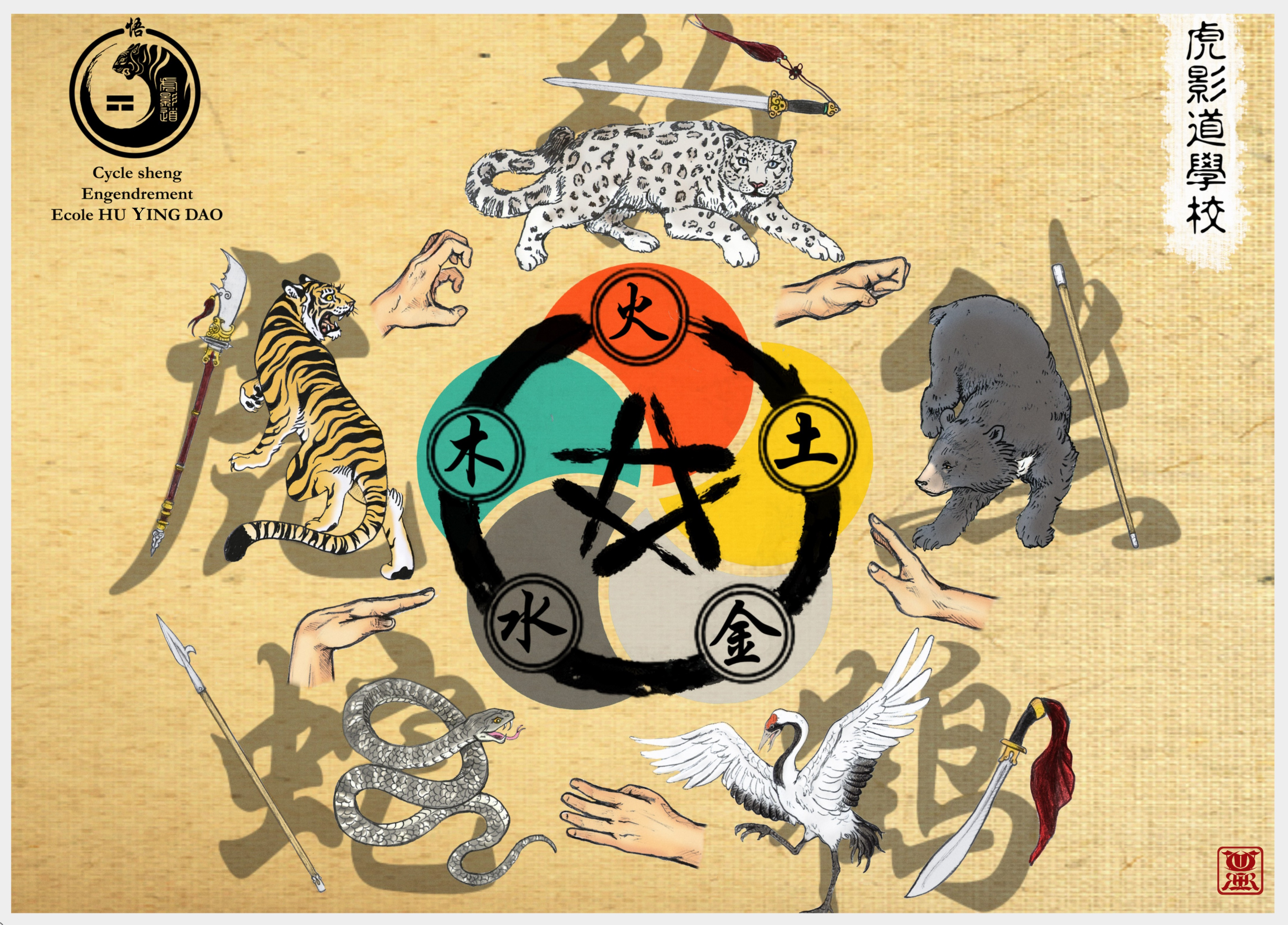 Cycle Engendrement Domination SHENG/KE